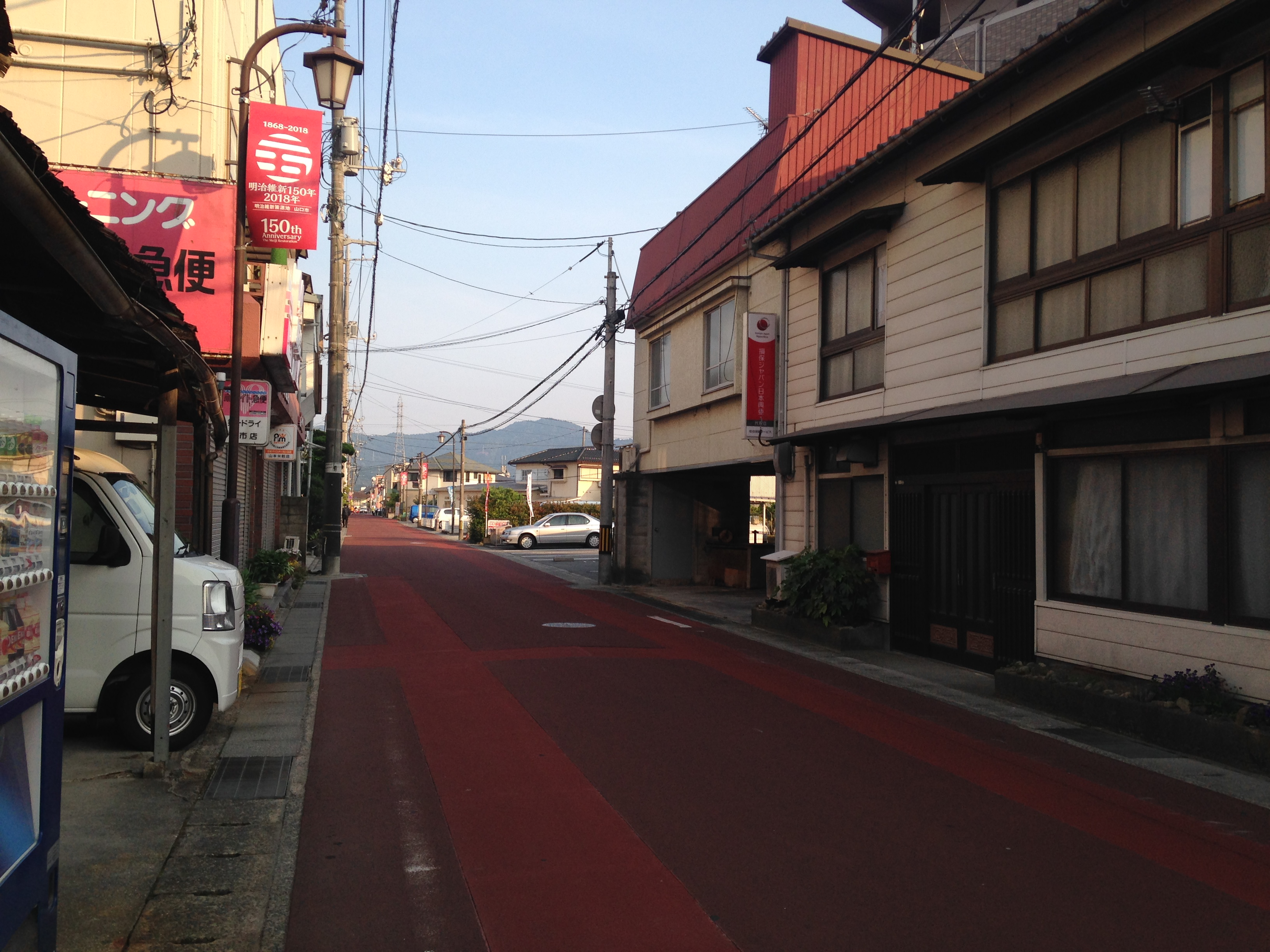 湯田温泉駅前のおいでませ駅通り(山口県道206号)